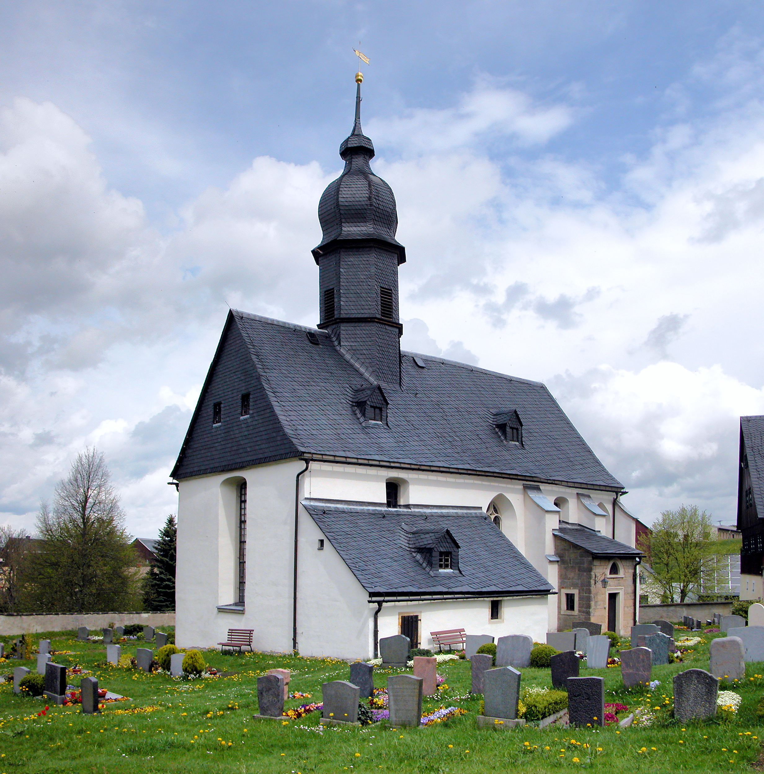 06.05.2015 01762 Hartmannsdorf (Hartmannsdorf-Reichenau), Kirchweg 51 (GMP: 50.829313,13.558753): Die Dorfkirche Hartmannsdorf ist die Wallfahrtskirche St. Laurentius. 1346 wurde sie als solche erstmalig erwähnt, dabei ist sie mit Sicherheit viel älter. 1512, 1743 und 1850 erfolgten Um- und Anbauten. [DSCN5171&5172.JPG]20150506200MDR.JPG(c)Blobelt